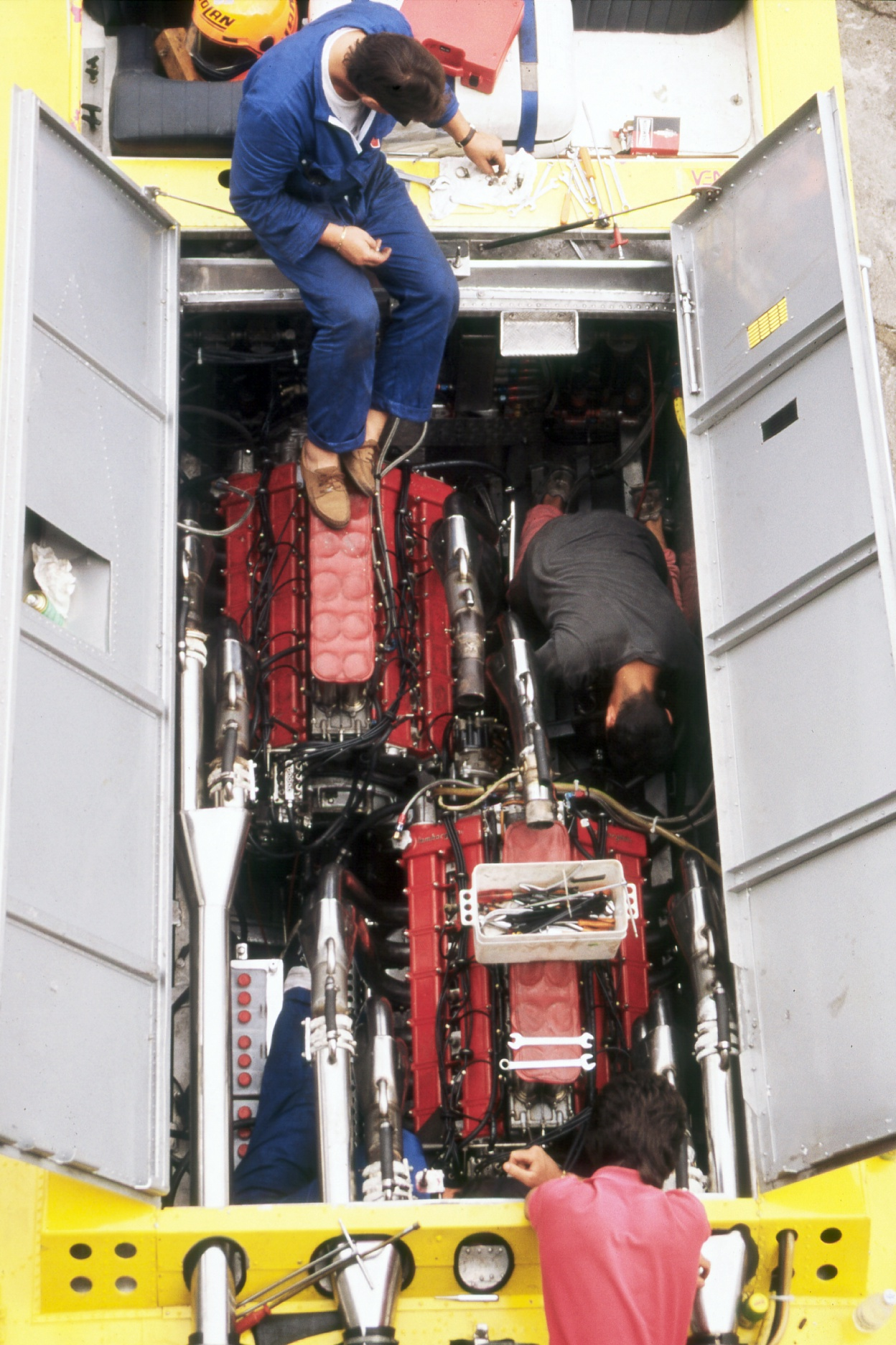 12-Zyl. Lamborghini-Motoren in einem Offshore-Rennboot